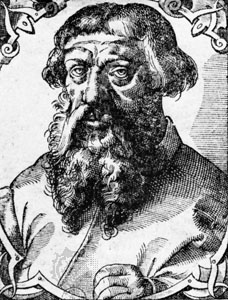 Étienne Dolet, incisione